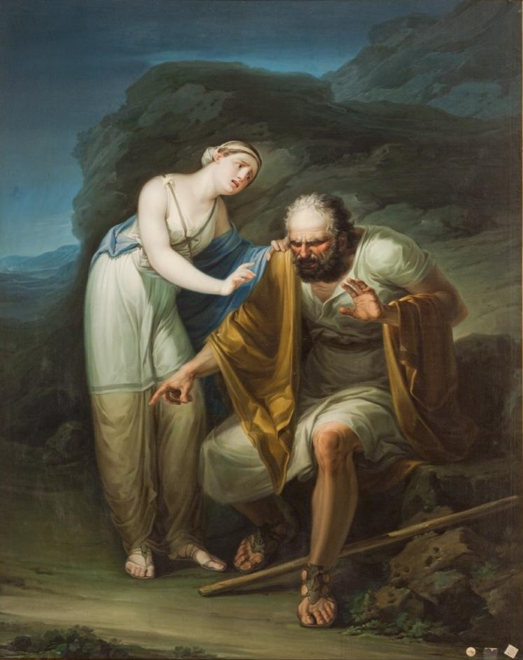 La obra representa a Edipo y a su hija Antígona.